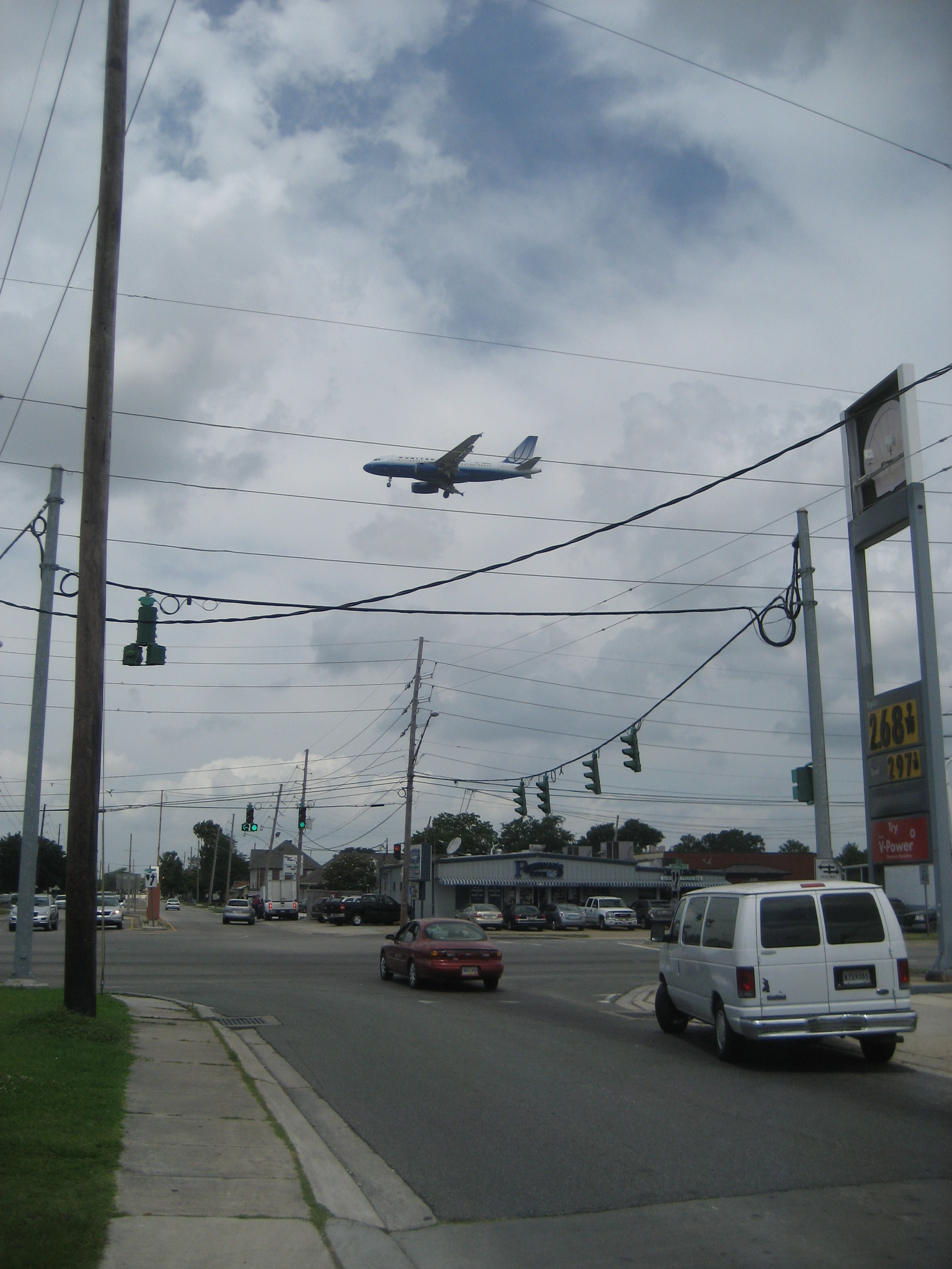 Kenner, Louisiana.